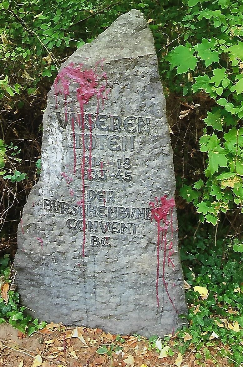 Gedenkstein des Burschenbunds-Convents auf dem Marburger Schlossberg